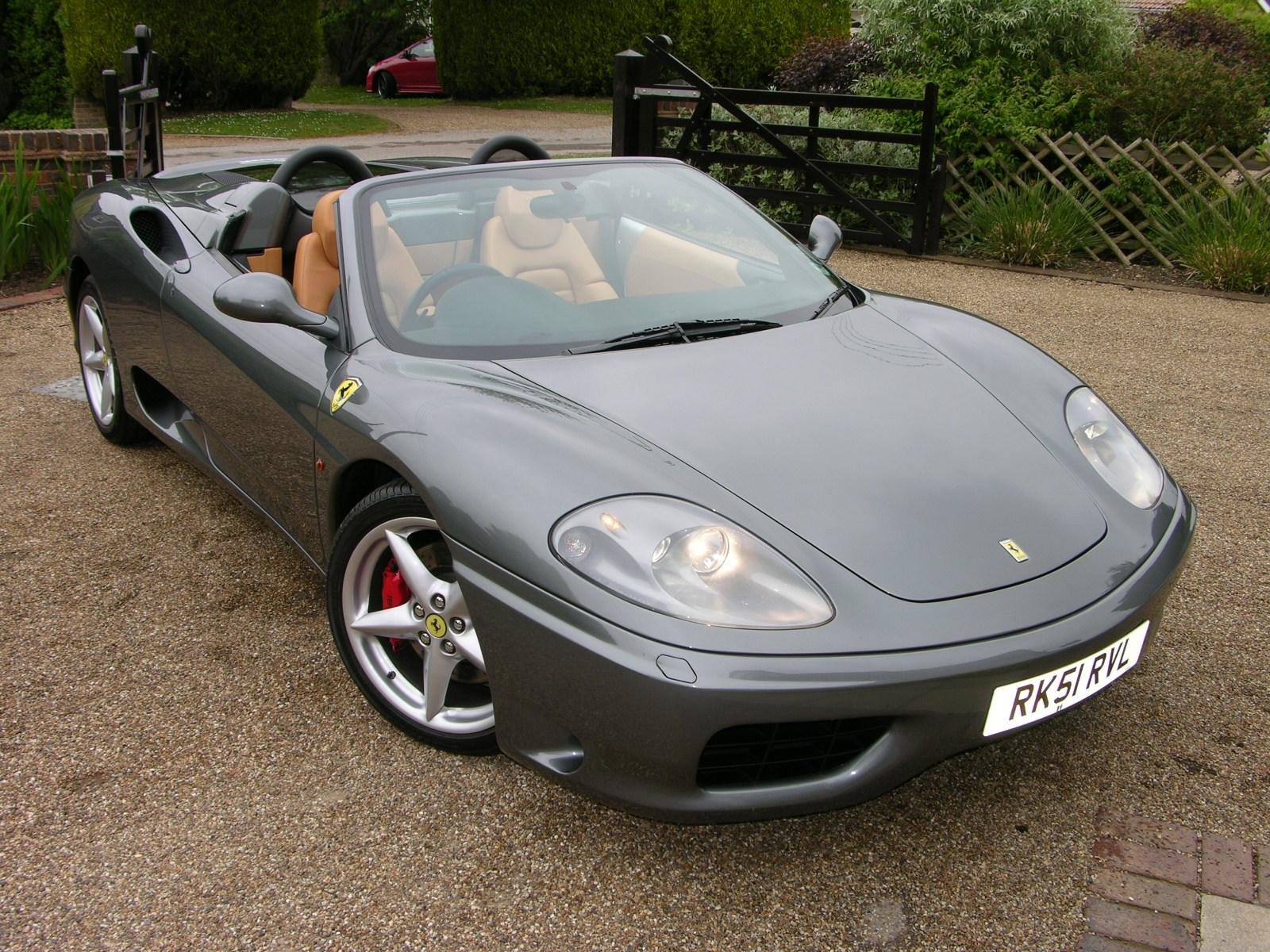 Ferrari 360 Spider F1